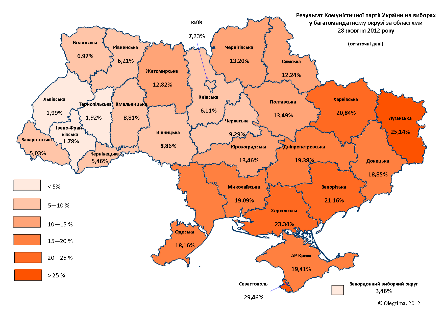 результат КПУ